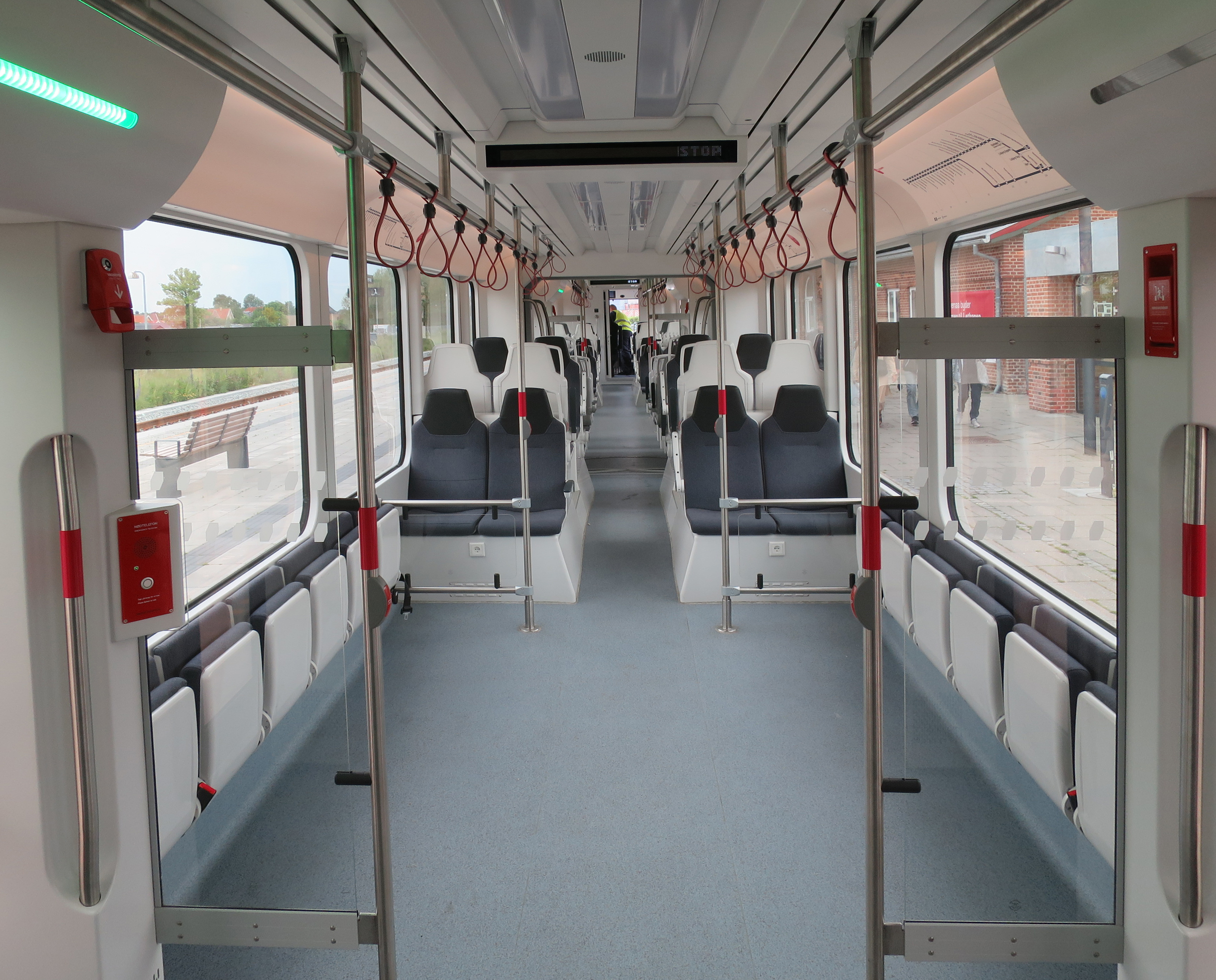 Aarhus Letbane, Innenansicht